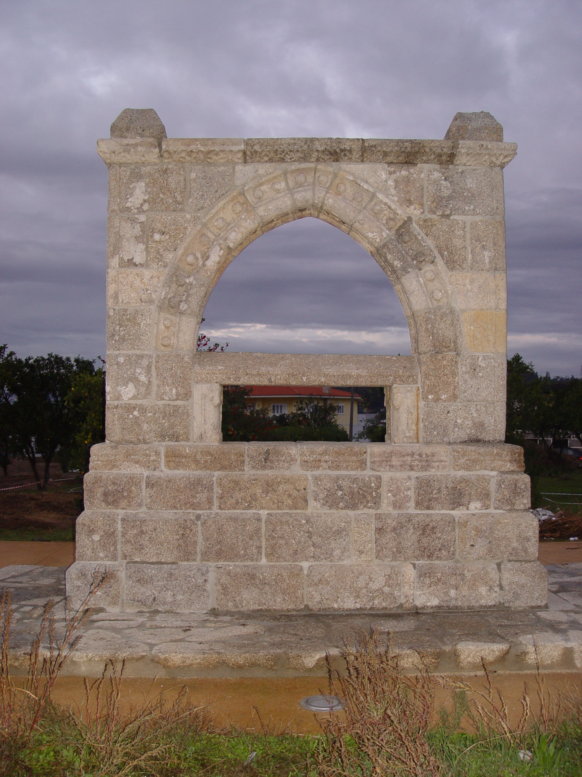 Memorial de Irivo, Penafiel